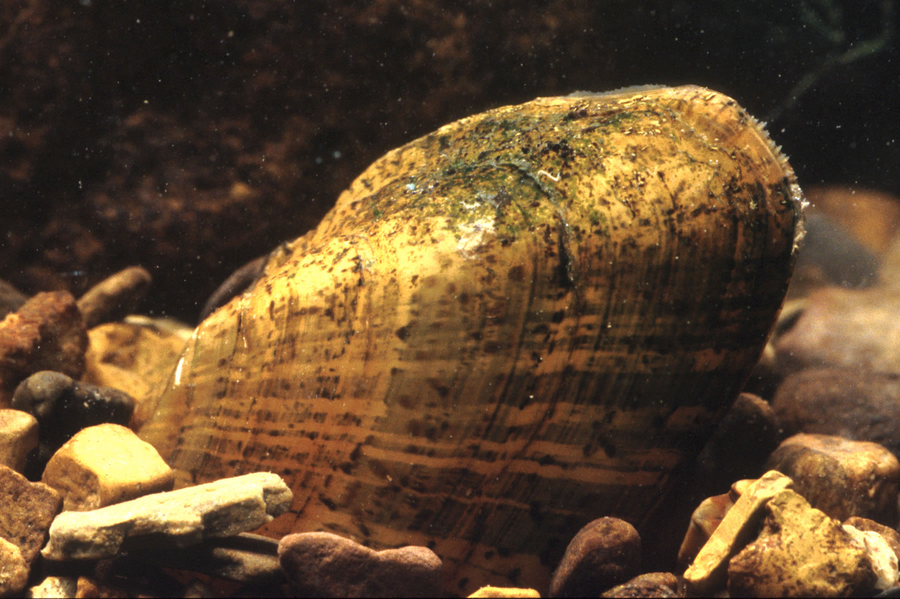 Alasmidonta marginata